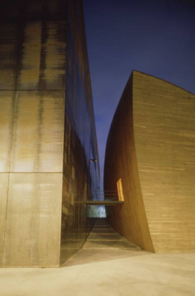 Fachada exterior de la Fundación Fidas en Sevilla